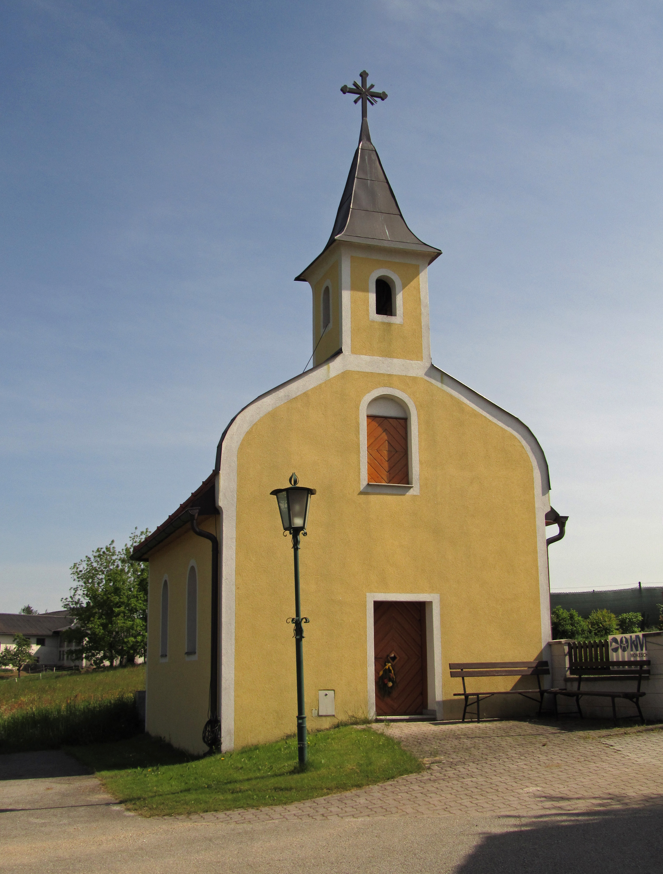 Ortskapelle Groß-Höbarten